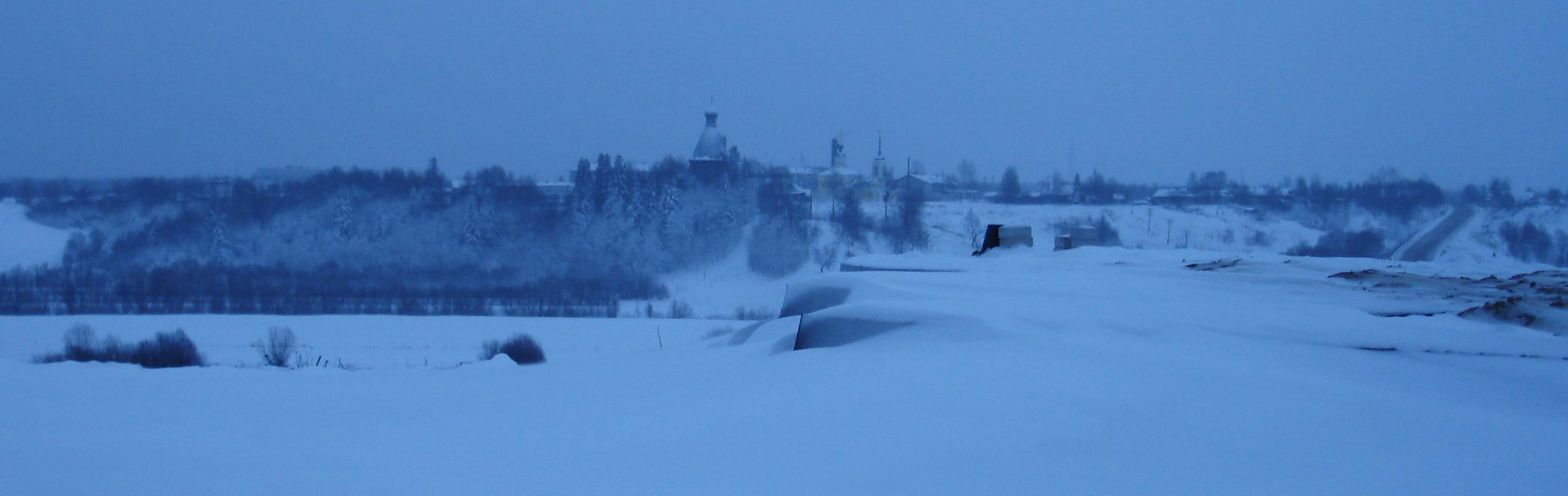 Посёлок Лявля.